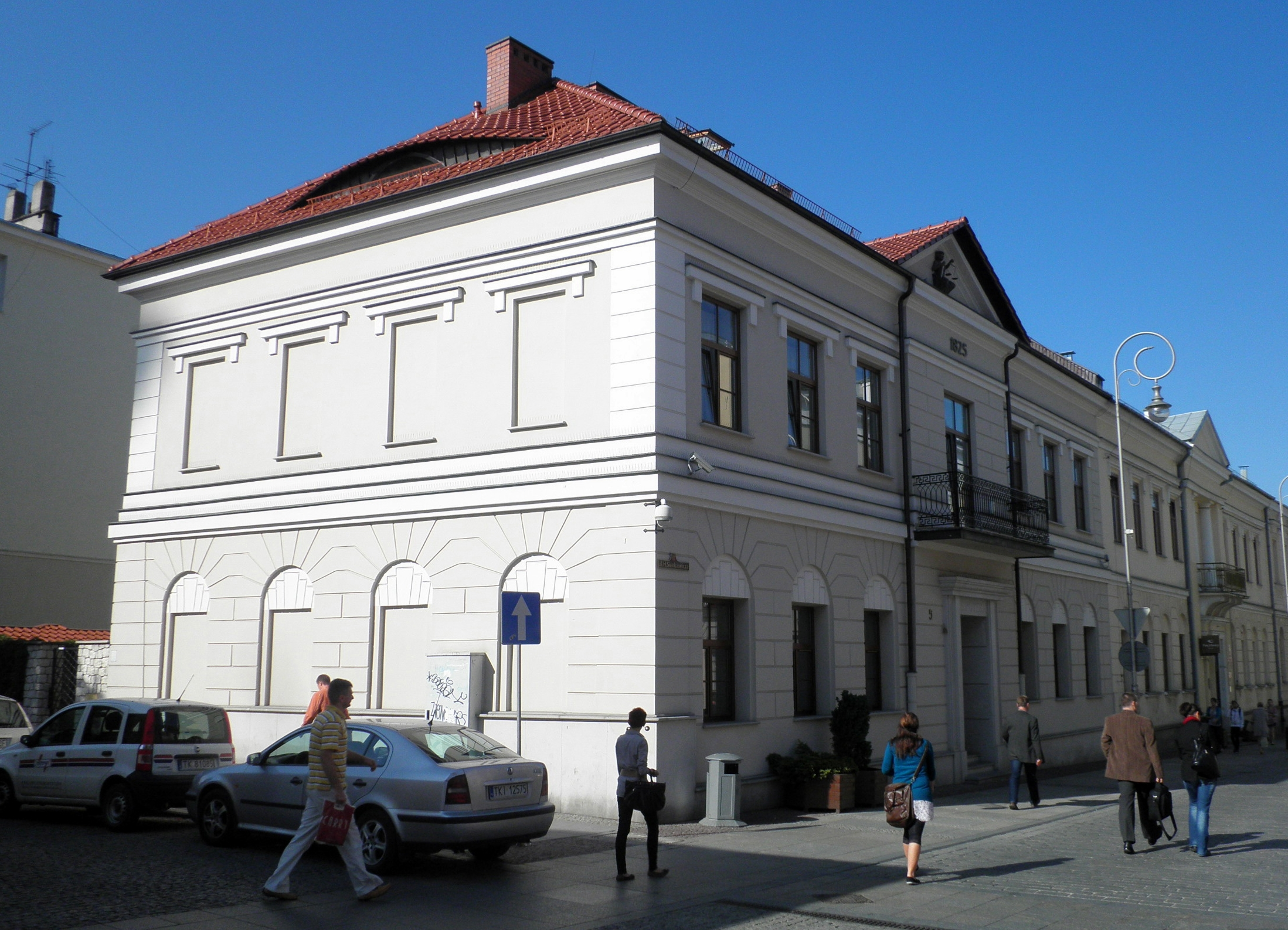 Dom przy ul. Sienkiewicza 5 w Kielcach 370 z 6.09.1971.